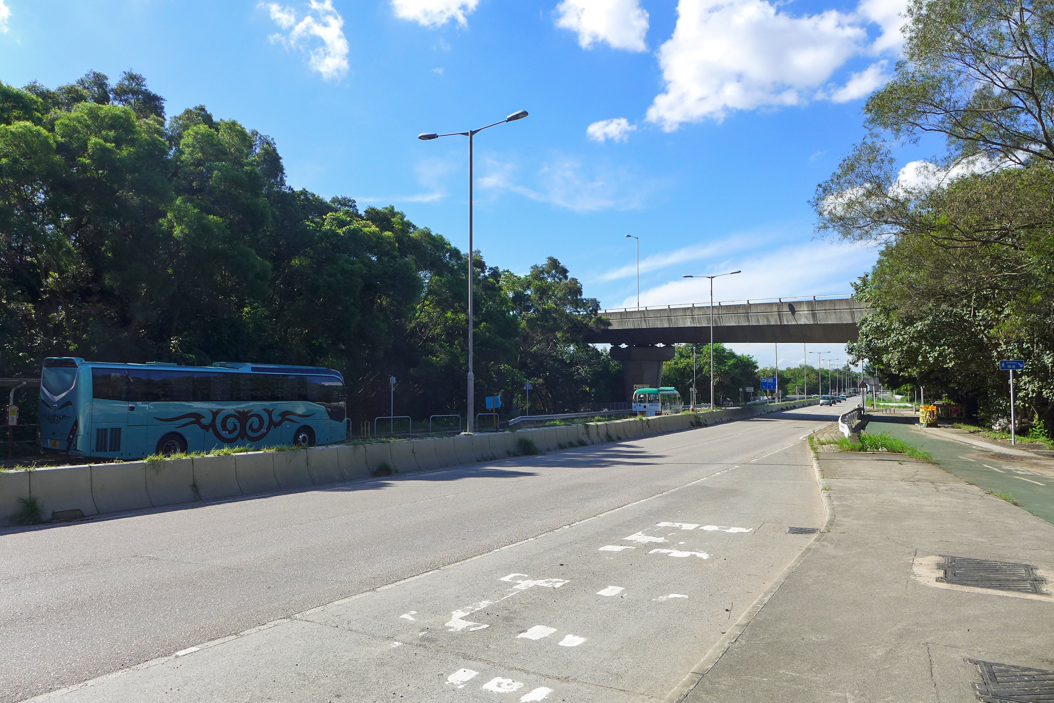 Hung Mo Kiu